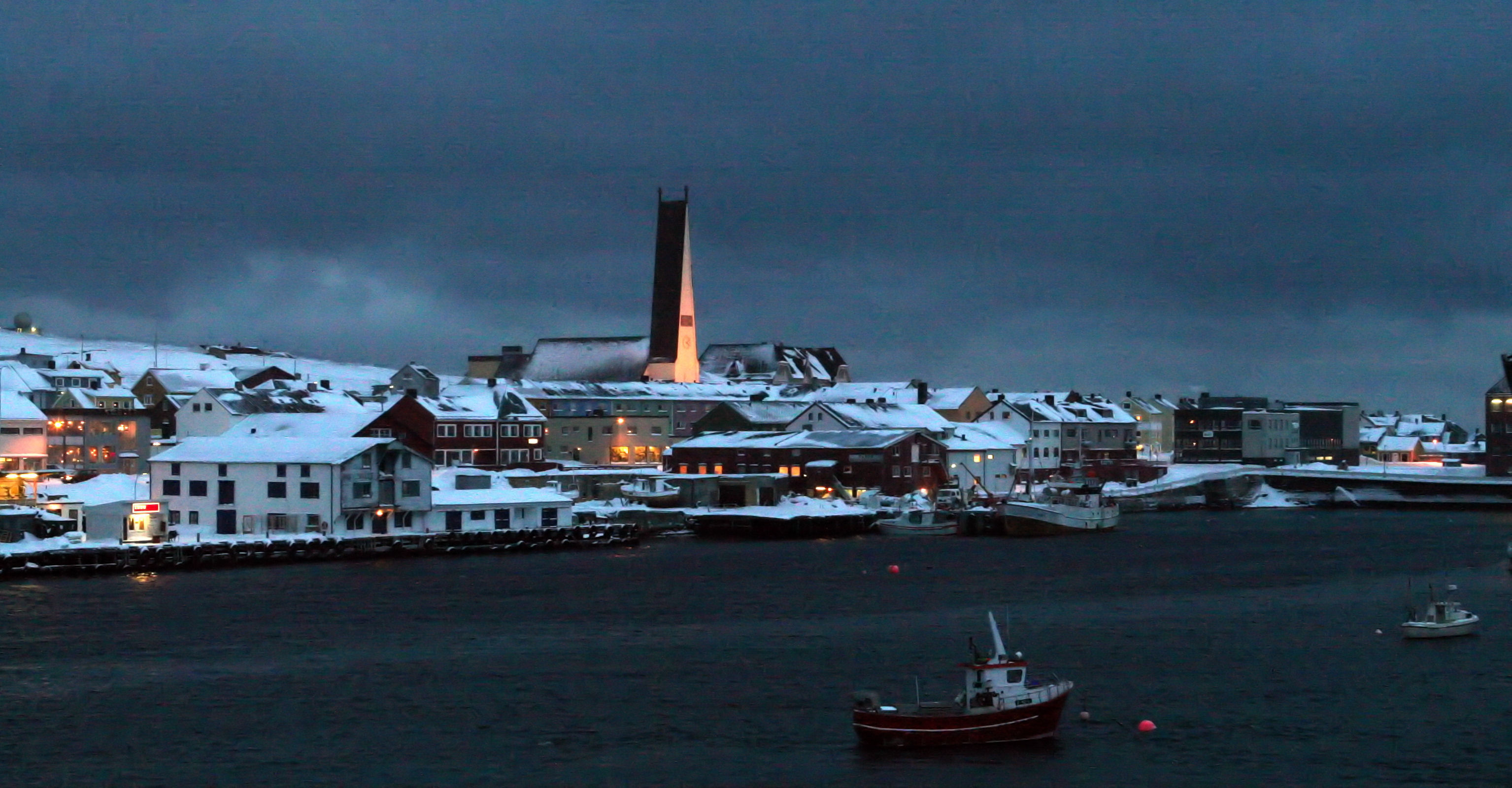 Winter 2006-2007.